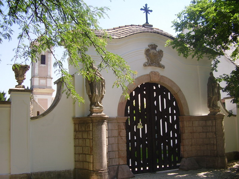 Majki műemlékegyüttes egyik kapuja